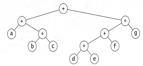 primjer aritmetickog izraza